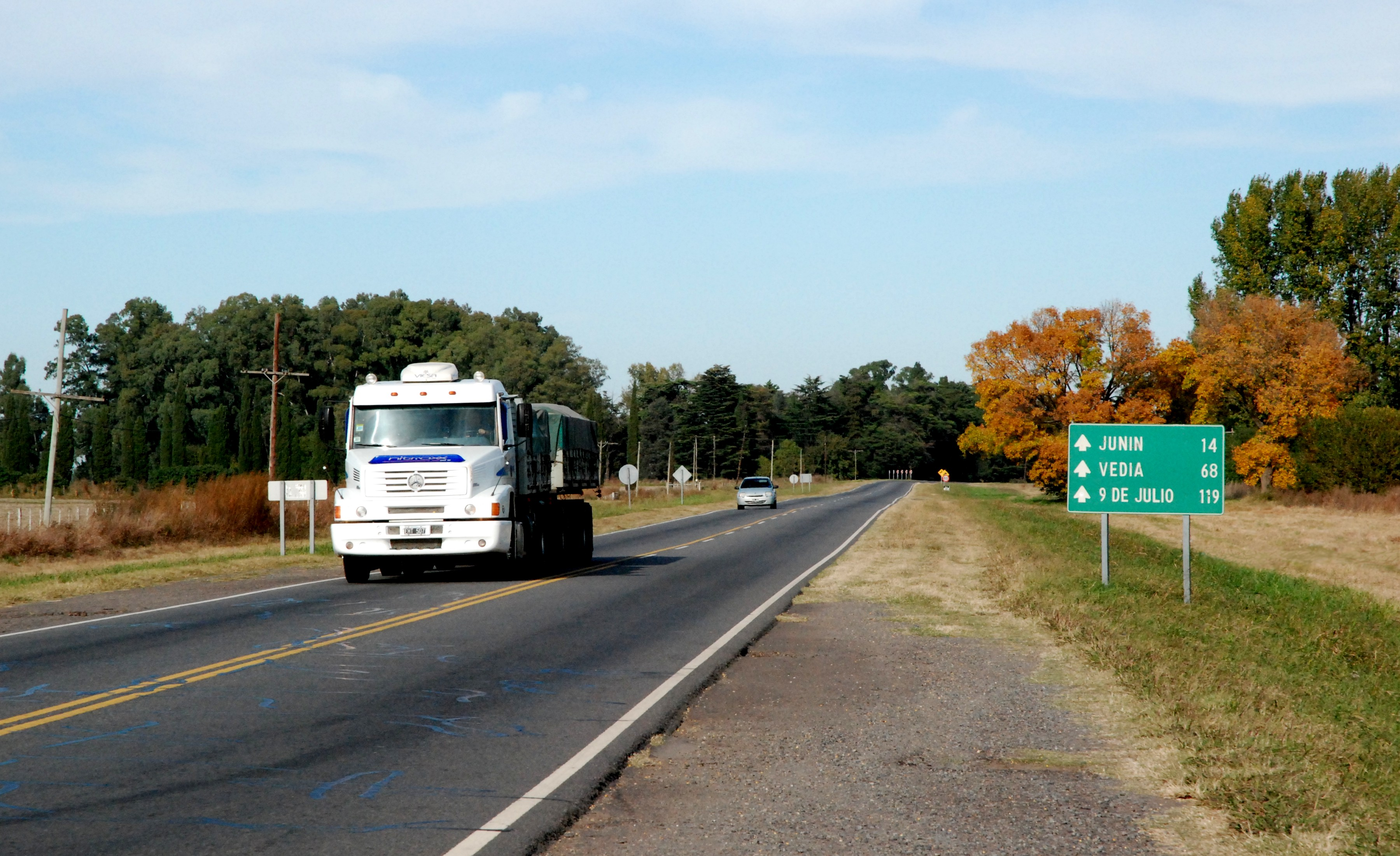 Ruta nacional Nº 188 km 148, junto al acceso a la localidad de Agustín Roca, partido de Junín, Argentina.